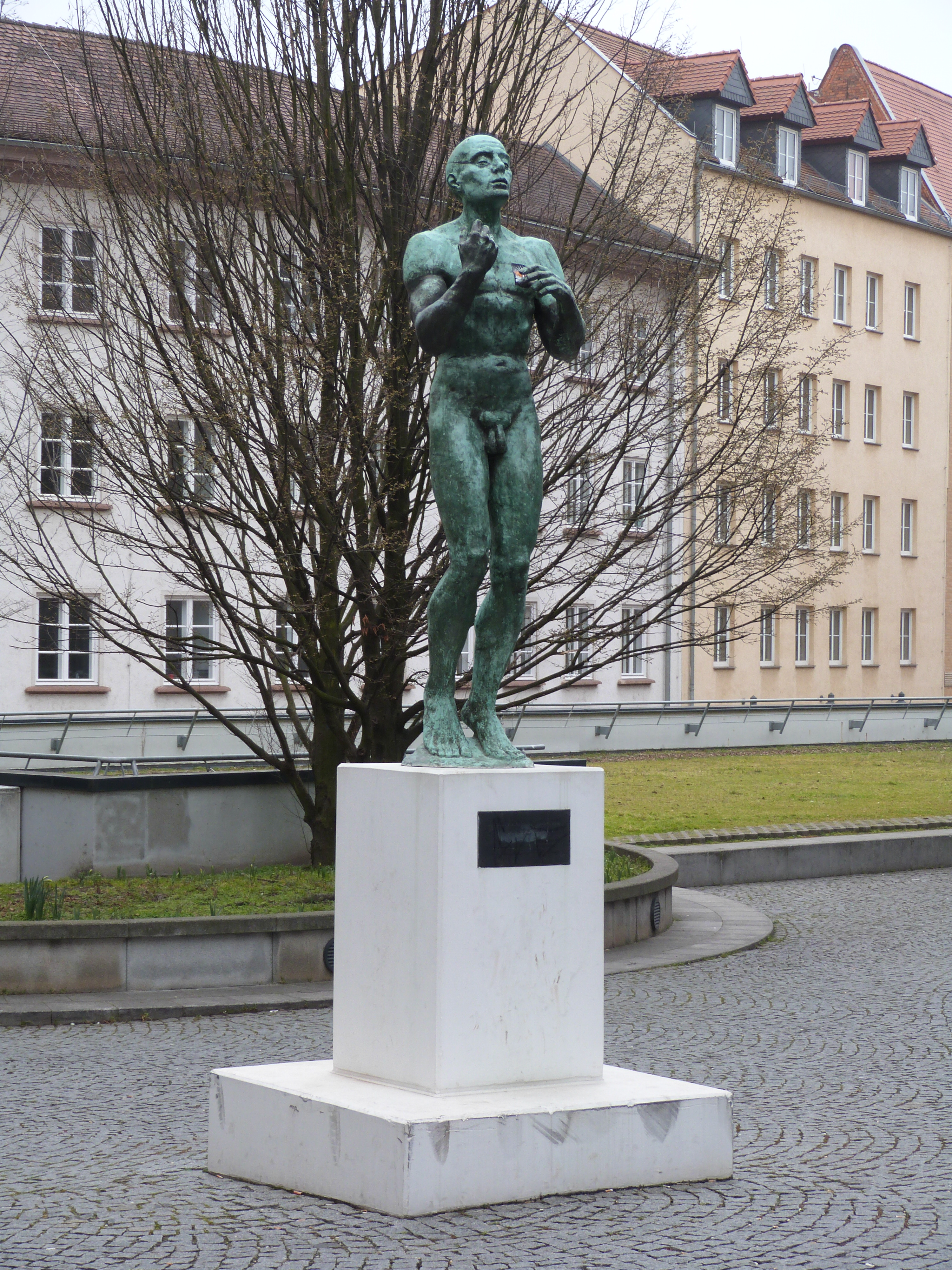 Herbert Volwahsen (1906-1988), Der Schauende, 1948, Bronze